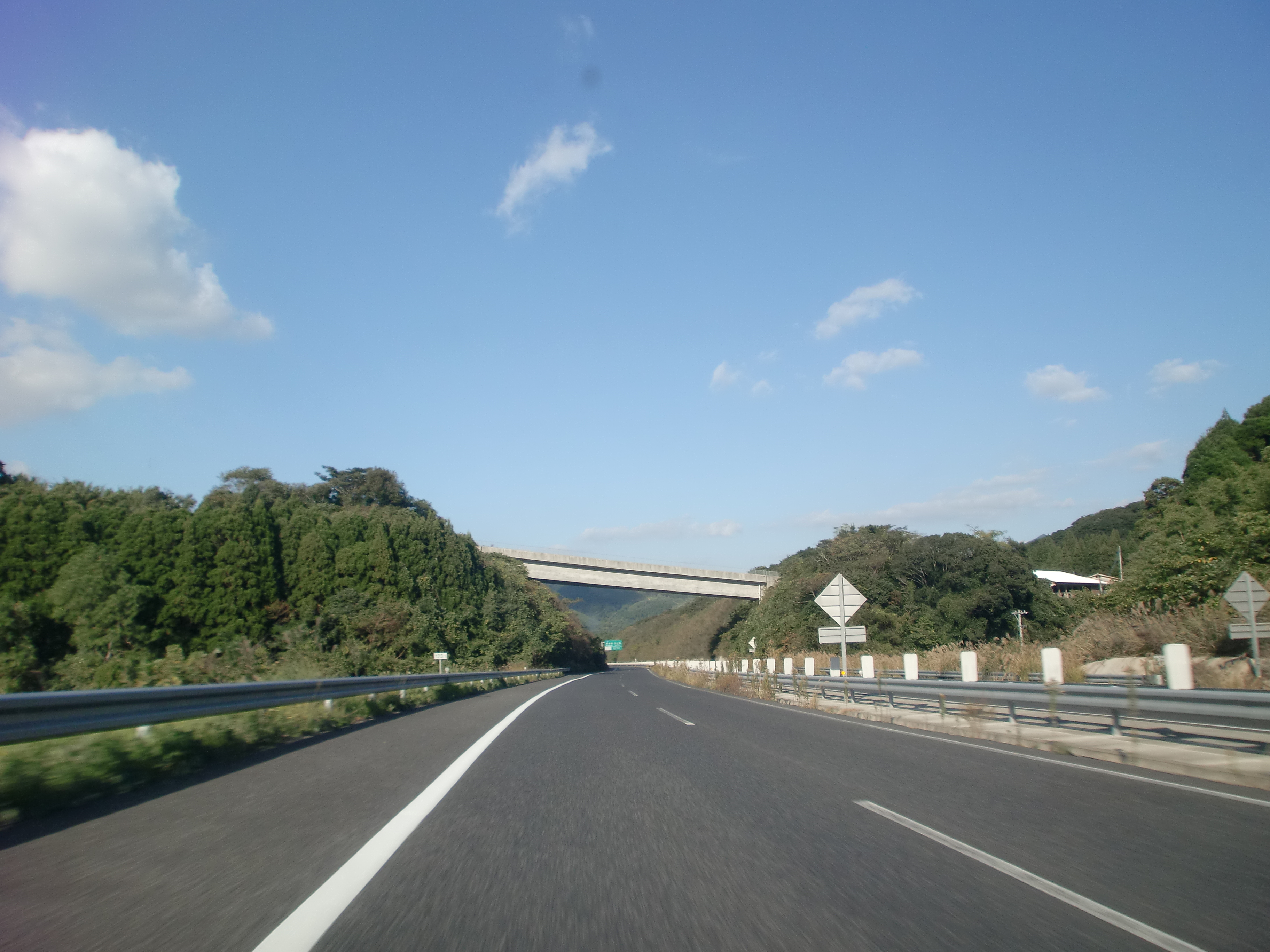 南九州西回り自動車道の串木野IC付近。